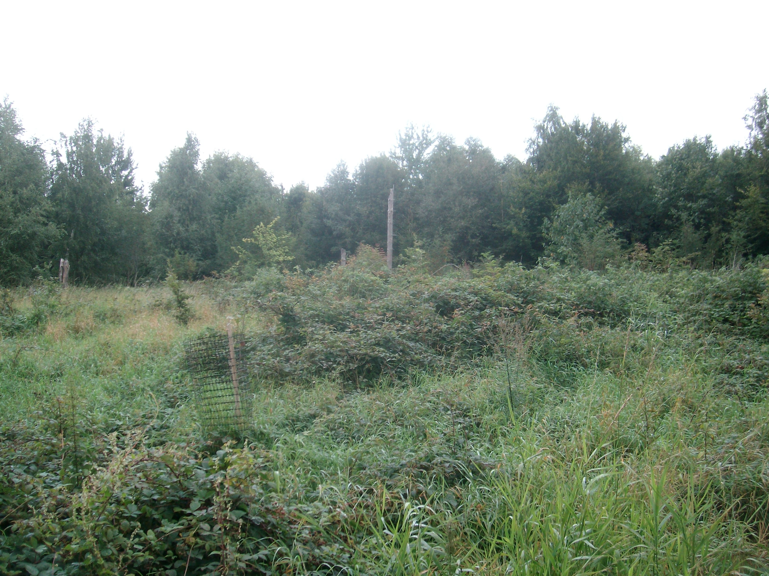 Wachposten 3/4* am Limes am Römerrundweg Hohenstein